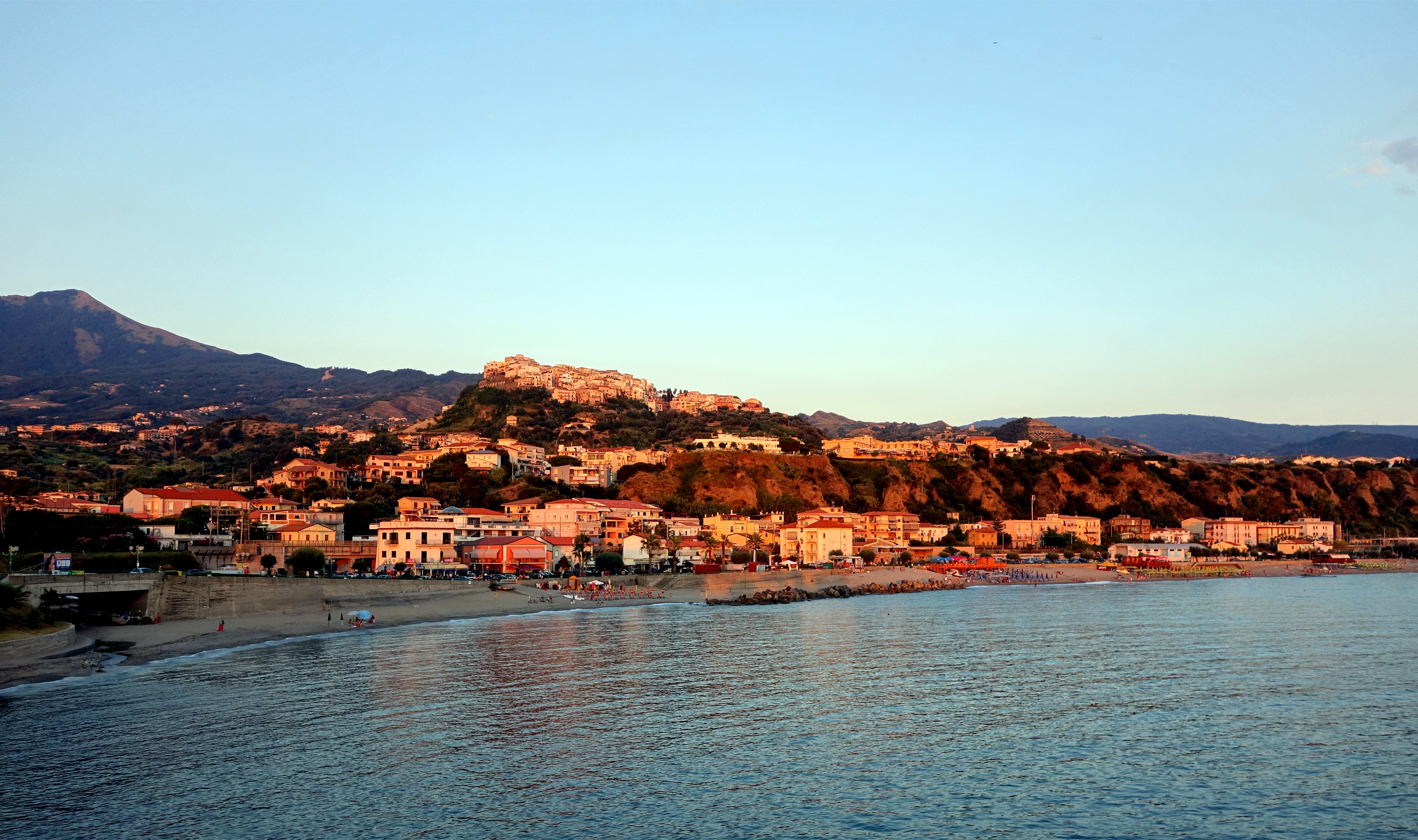 Vue générale de Belvedere Marittimo (Calabre).